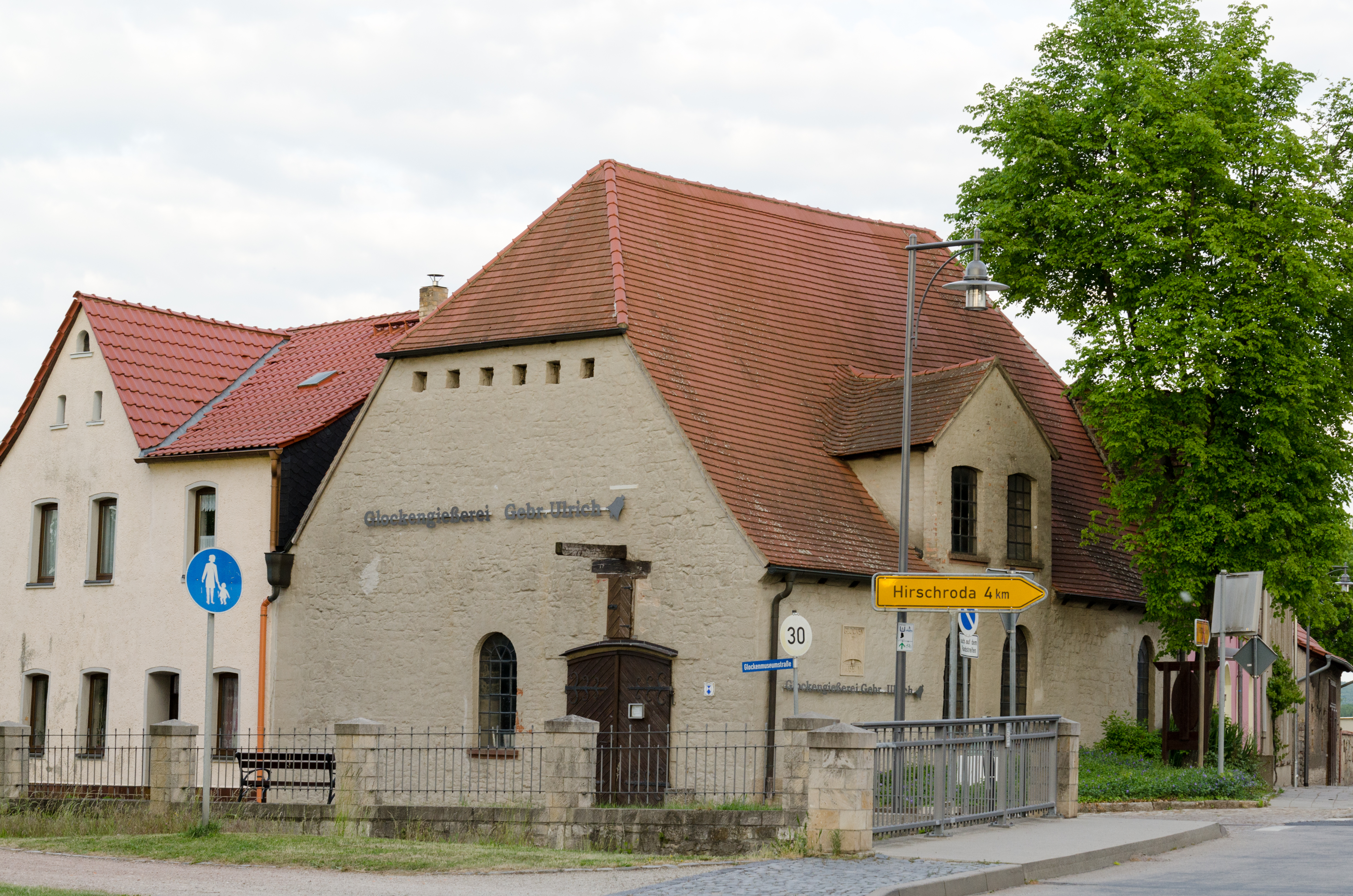 Laucha an der Unstrut, Glockenmuseumstraße 1